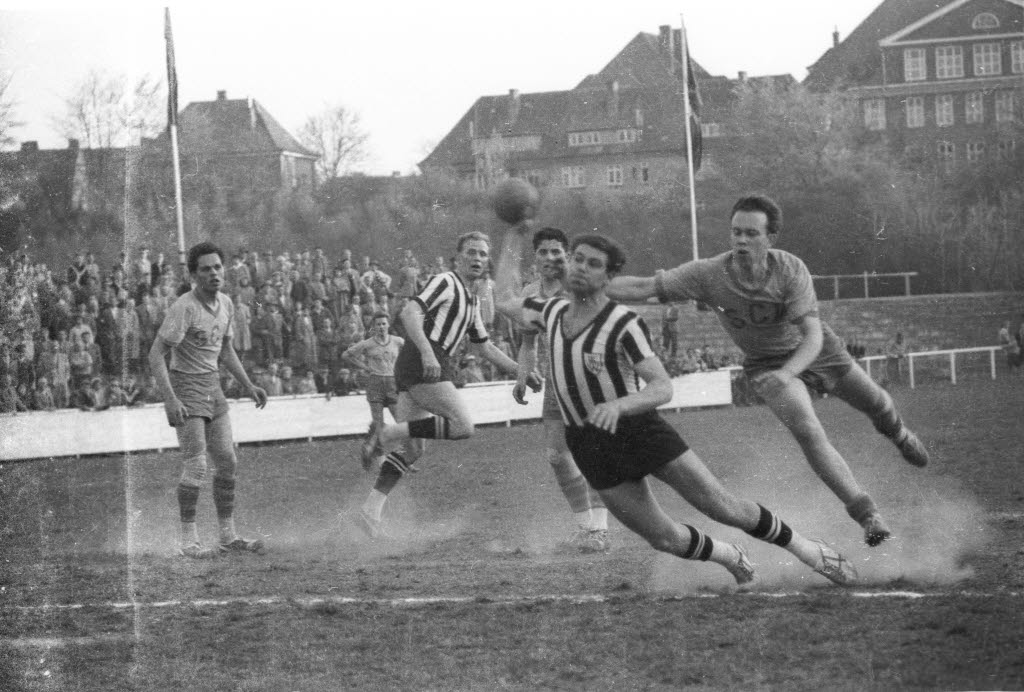 im Stadion Waldwiese an der Hamburger Chaussee. Im Bild u.a. THW-Spieler Arthur Heinzel (2.v.r.).